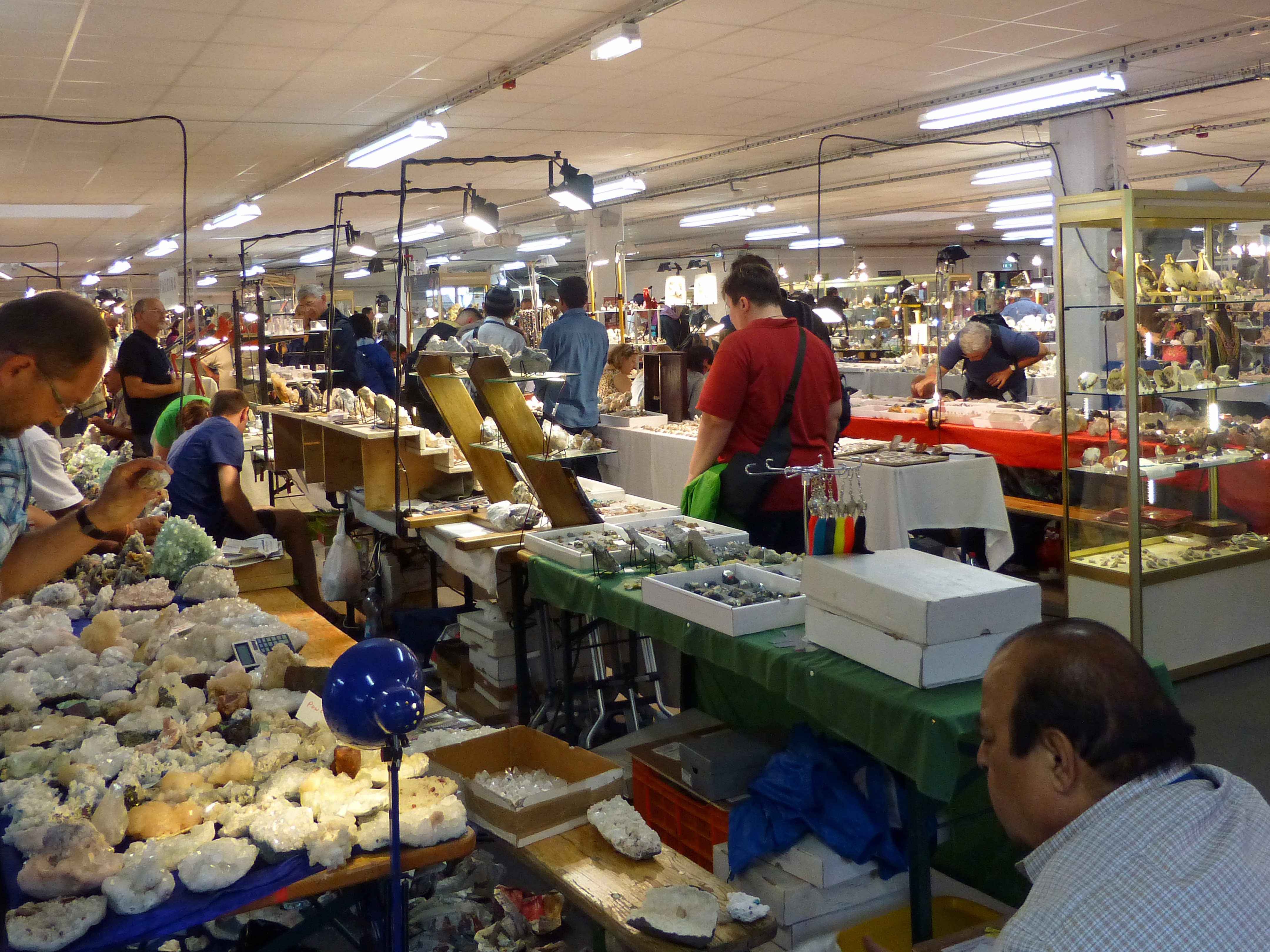 Sainte-Marie-aux-Mines (Haut-Rhin) : exposition internationale Mineral & Gem 2014